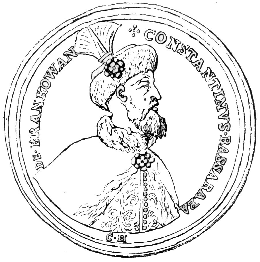 Монета с К. Брънковяну.